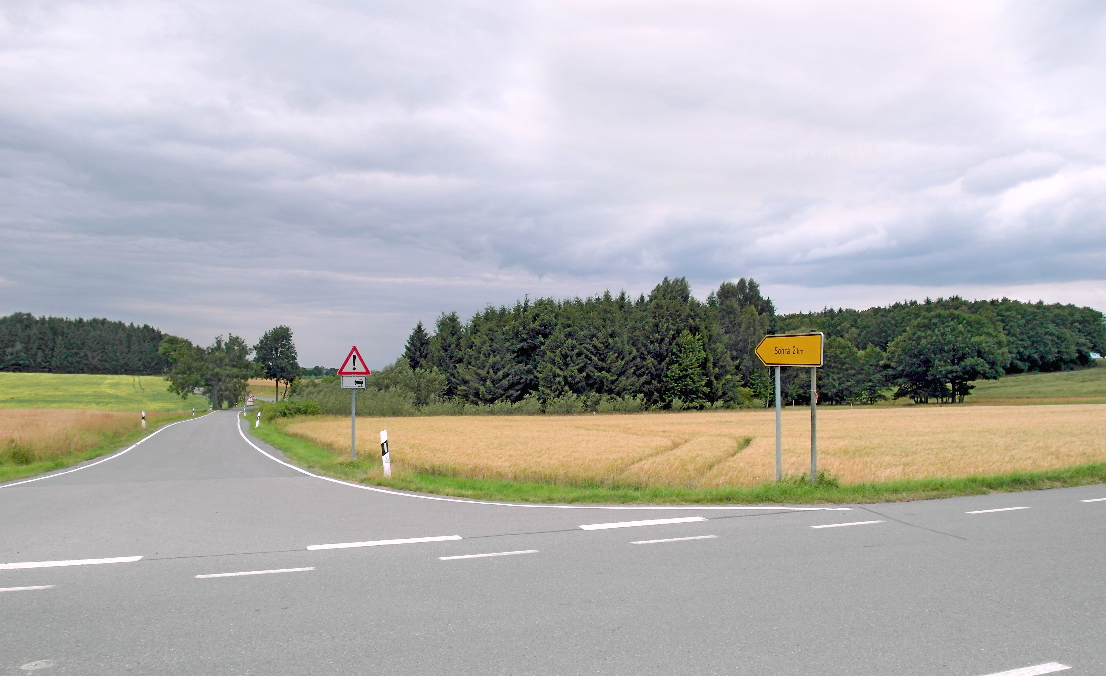 12.07.2017 09627 Sohra (Bobritzsch-Hilbersdorf): Gelände an der Kreuzung der Pretzschendorfer Straße mit der Ortsstraße Sohra. Hier (etwa GMP: 50.857402,13.509681) - jetzt Vorwerksring genannt - hat sich im Mittelalter ein nicht mehr vorhandenes Ritterschoß bzw. eine Burg befunden. [SAM0898.JPG]20170712120DR.JPG(c)Blobelt